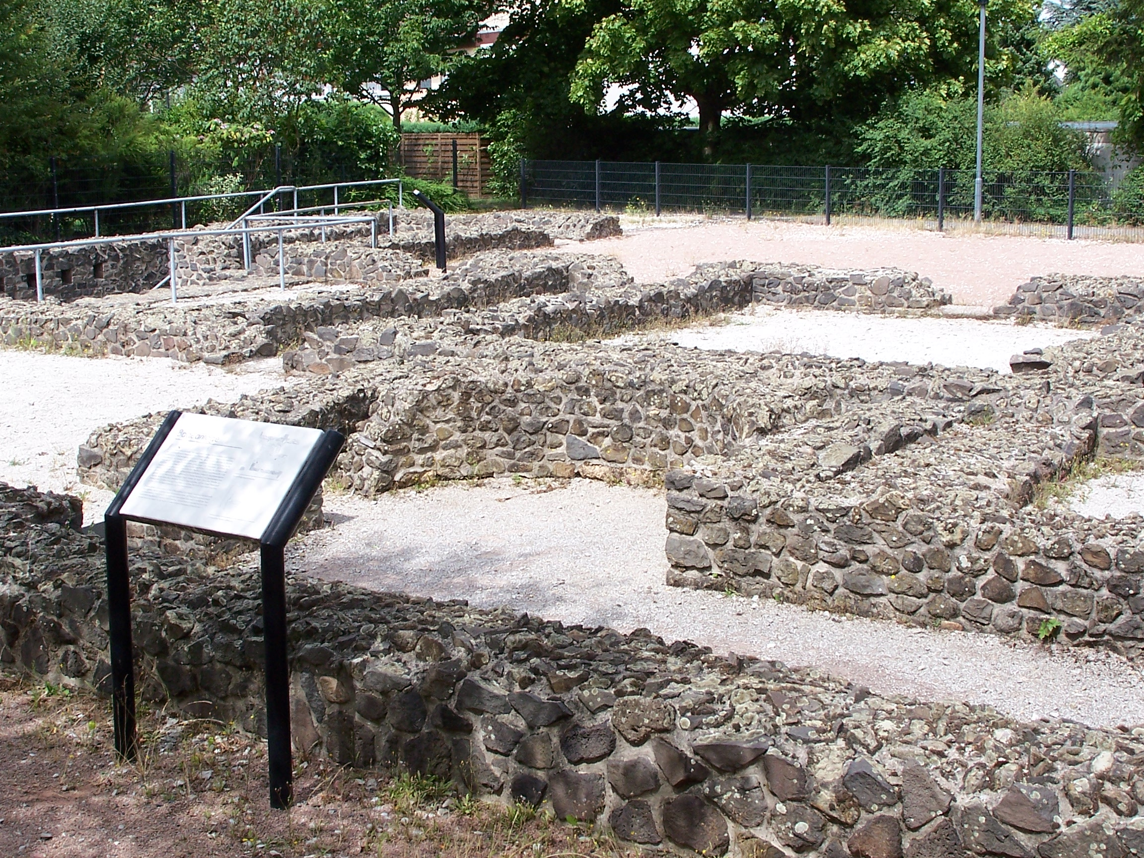 Archäologische Ausgrabungsstätte "Römische Villa", Ober-Eschbach (jetzt Stadtteil von Bad Homburg vor der Höhe)